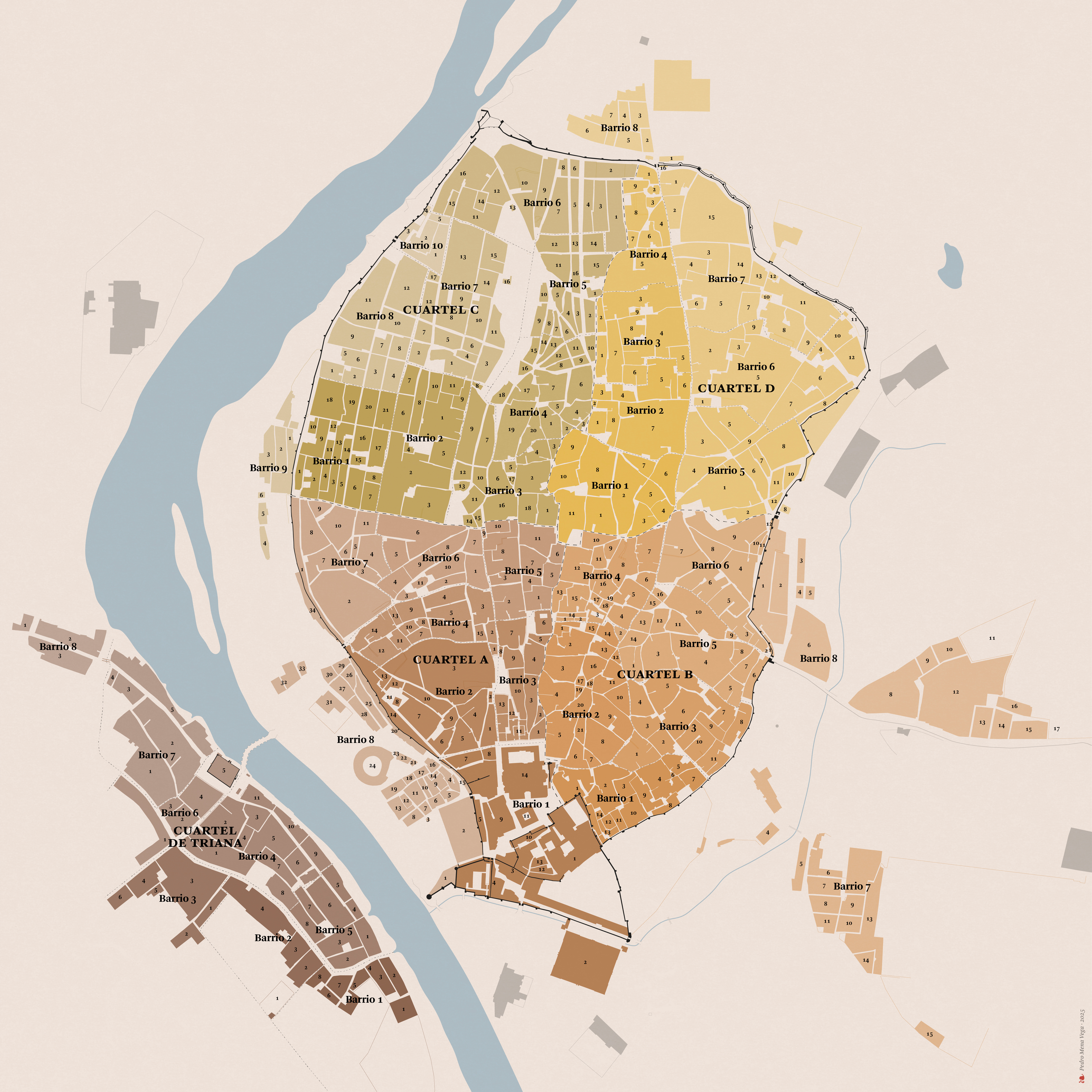 Plano de la división de Sevilla en 5 cuarteles, cada uno con 8 manzanas (salvo el 3.º, con 10) y todas sus manzanas numeradas, excepto las de los barrios de San Bernardo y San Roque. Este sistema de numeración estuvo en vigor hasta 1845. La base del mapa es una digitalización del plano levantado por Francisco Manuel Coelho para el asistente Olavide, que representa la ciudad en 1771.